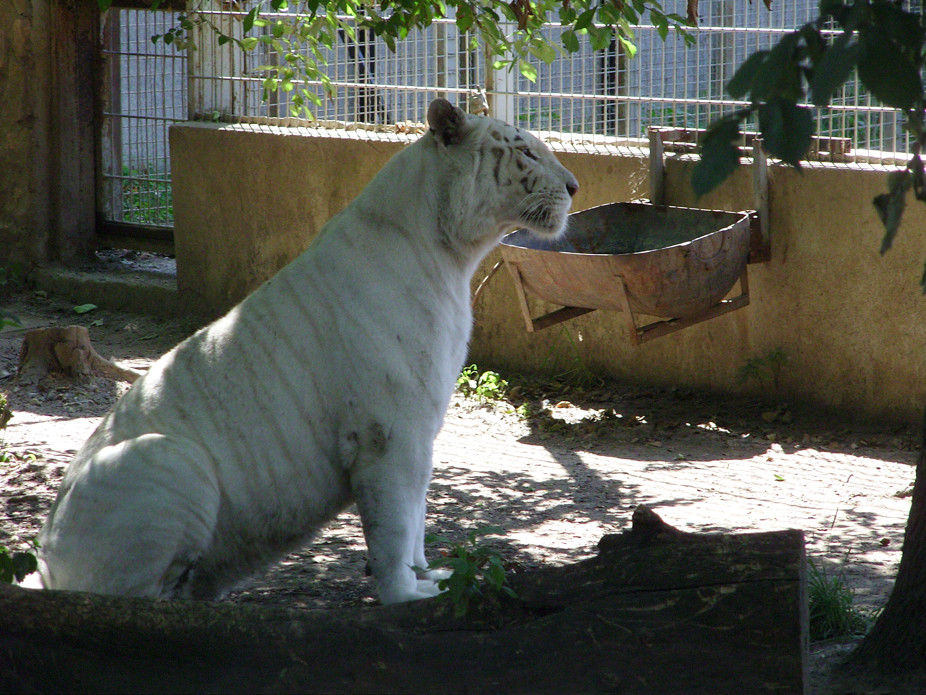 Hófehér tigris a nyíregyházi SóstóZoo-ban